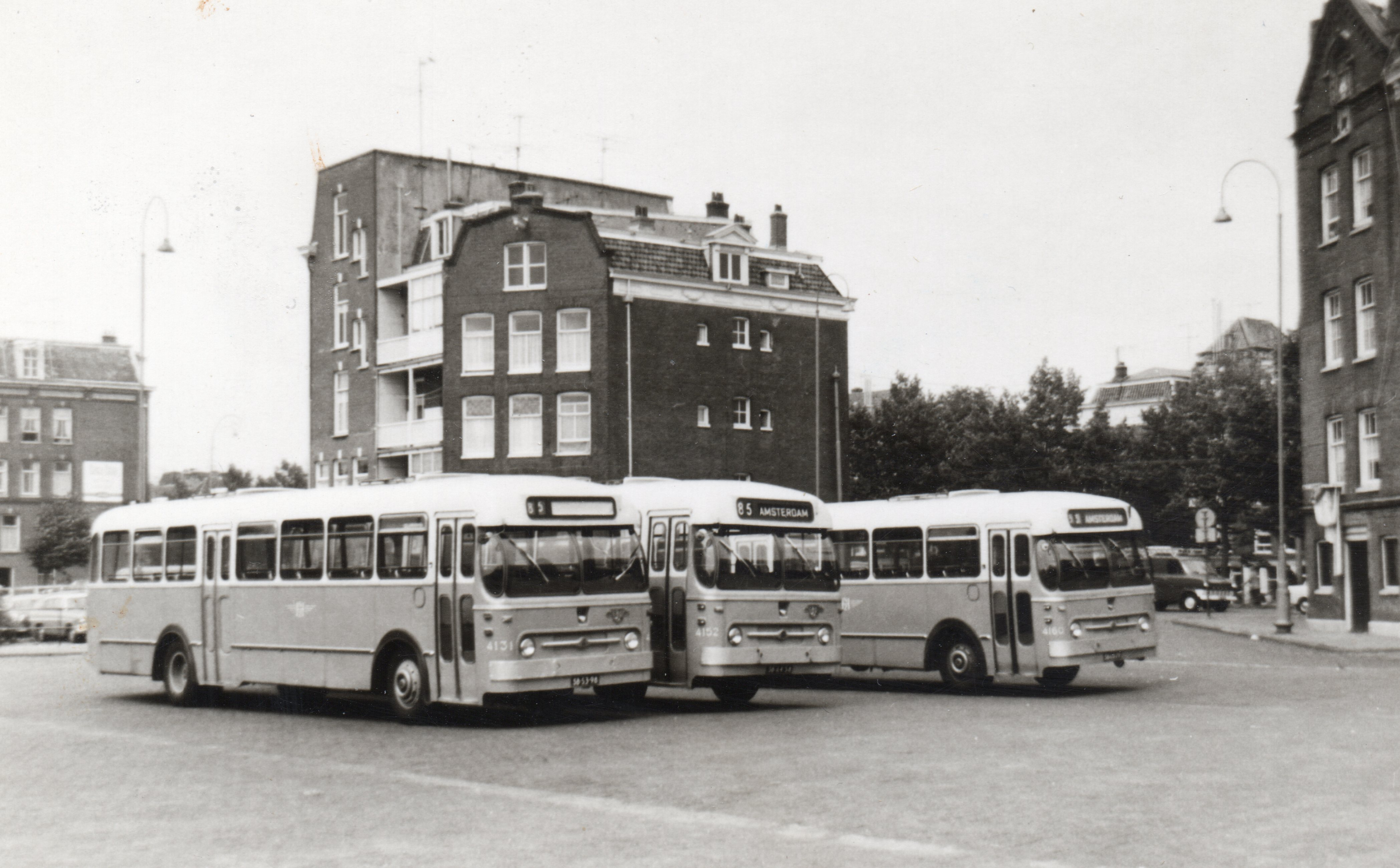 NZH-bussen 4131, 4152 en 4160, Leyland-Werkspoor bouwjaar 1957, in de Marnixstraat te Amsterdam, 1965.